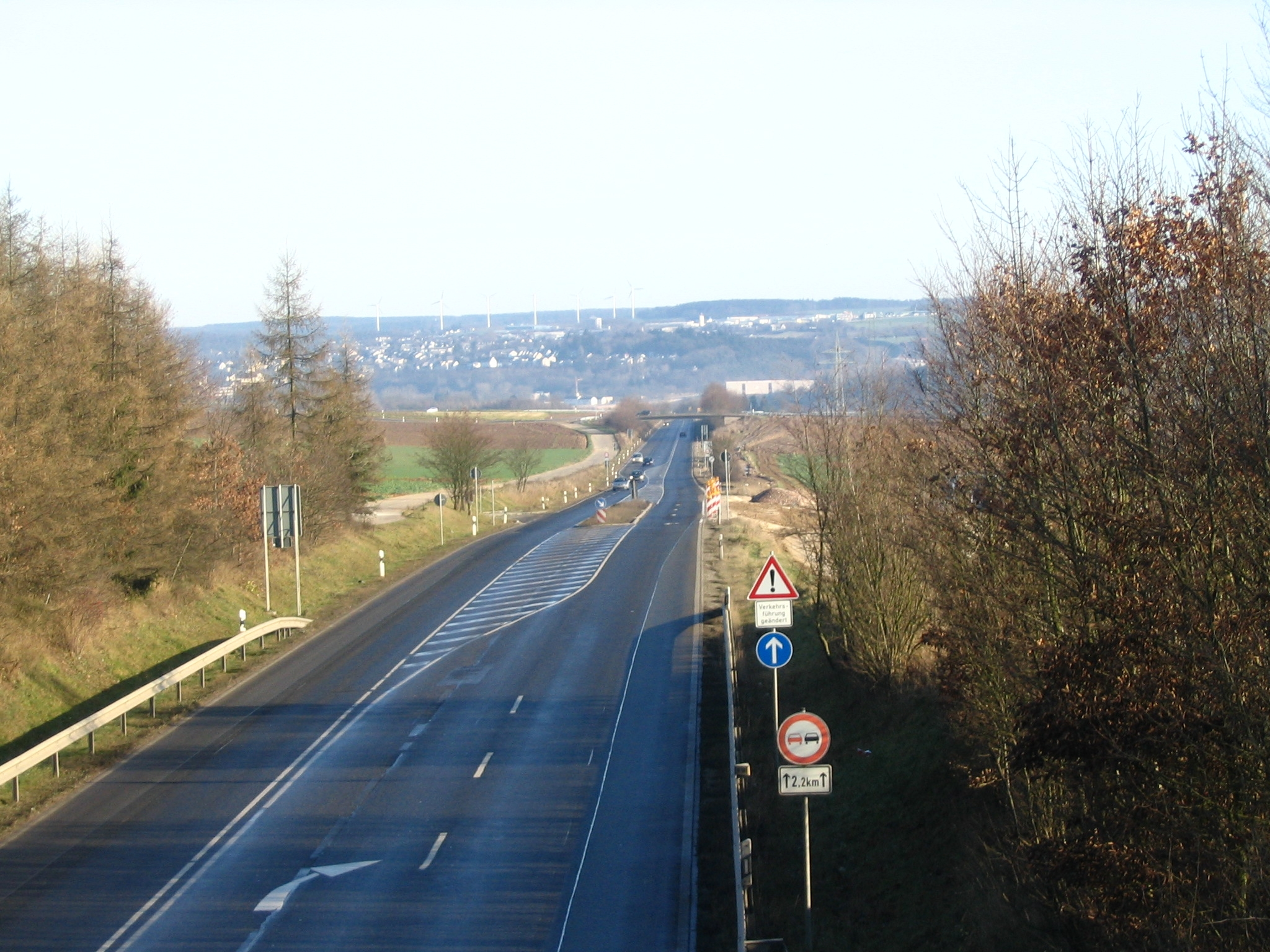 Bundesstraße B 50 im Hunsrück zwischen Simmern und Kirchberg